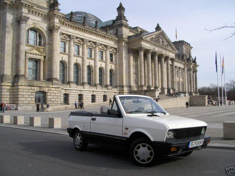 Ein privater Yugo Karol Cabrio eines freundes vorm Reichstag, Foto von Made in Yugoslavia siehe auch Bild:HPIM2583.JPG